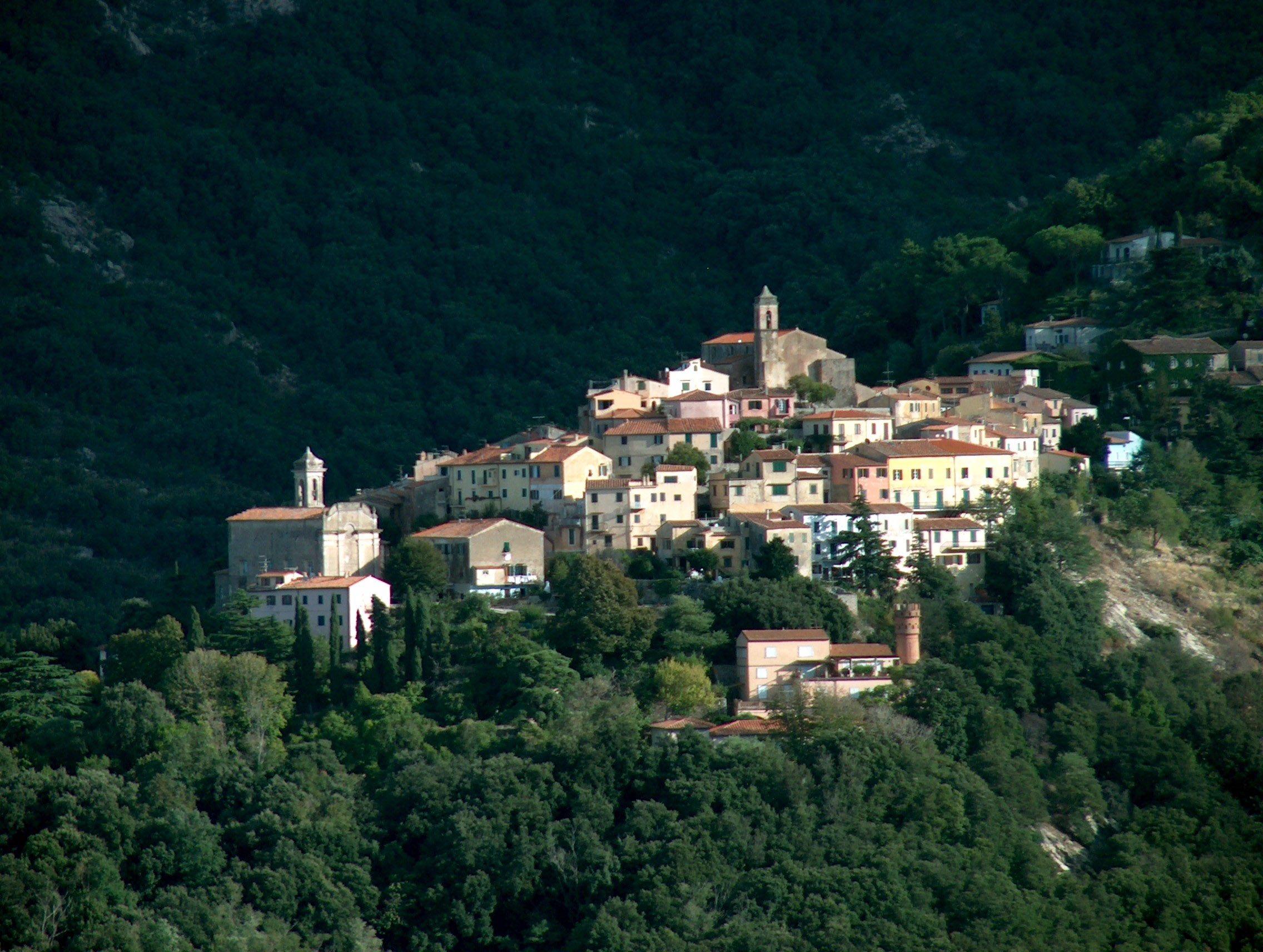 Der Ort Poggio in der Kommune Marciana